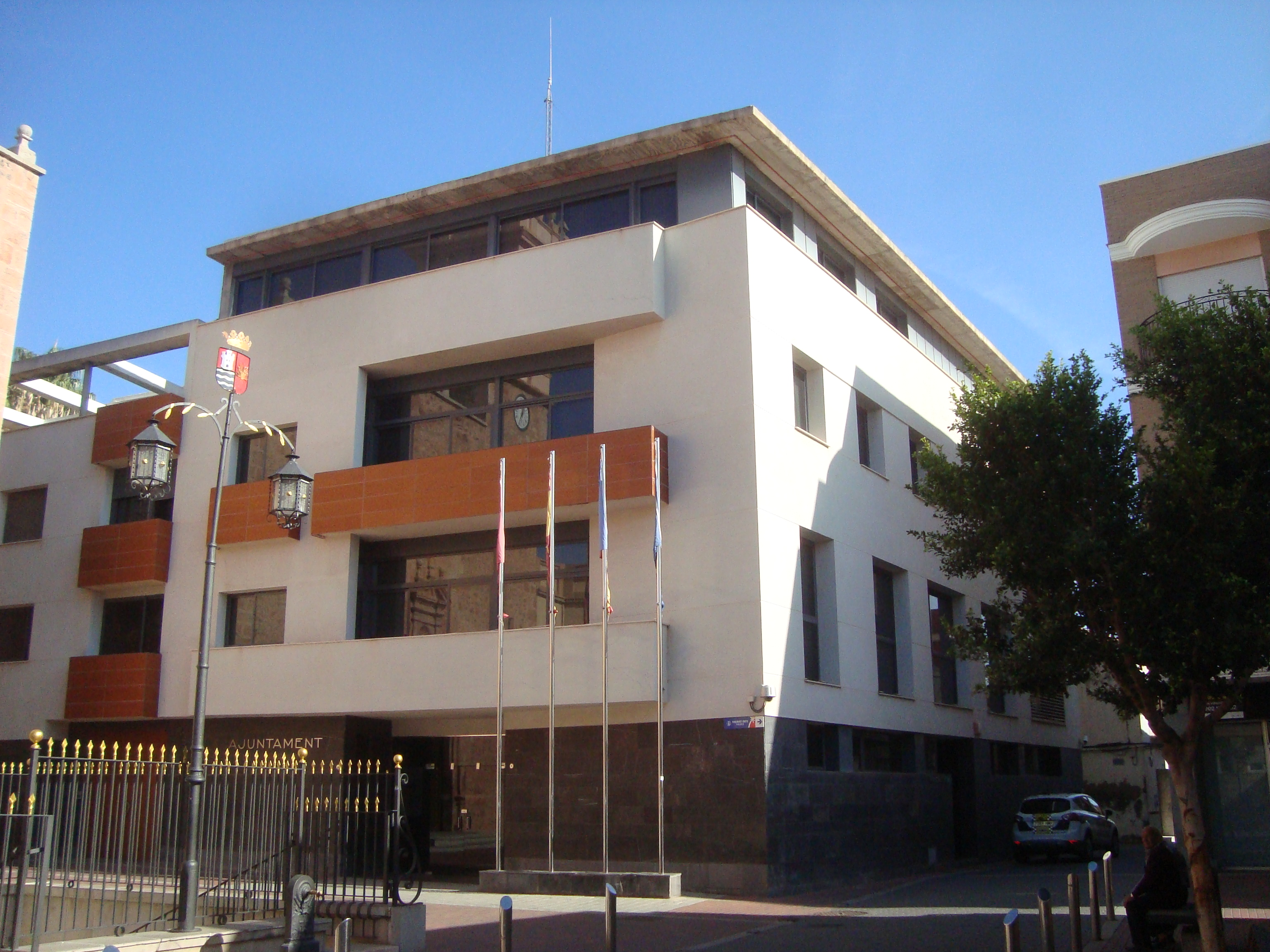 Ajuntament de Xilxes (Castelló)